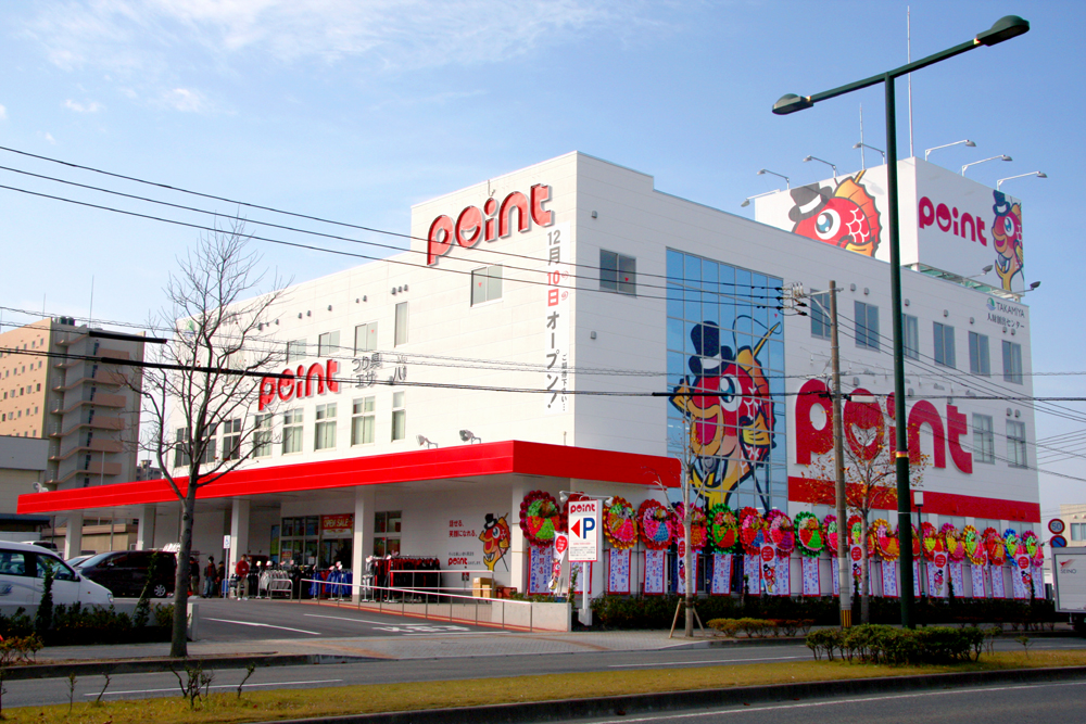 ポイント八幡本店